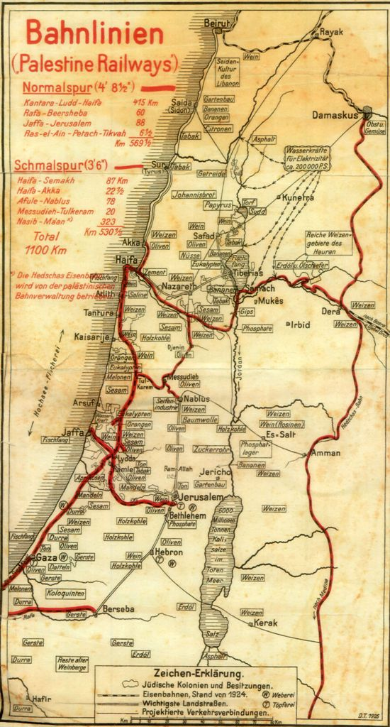 מפת רשת הרכבות בשנת 1924